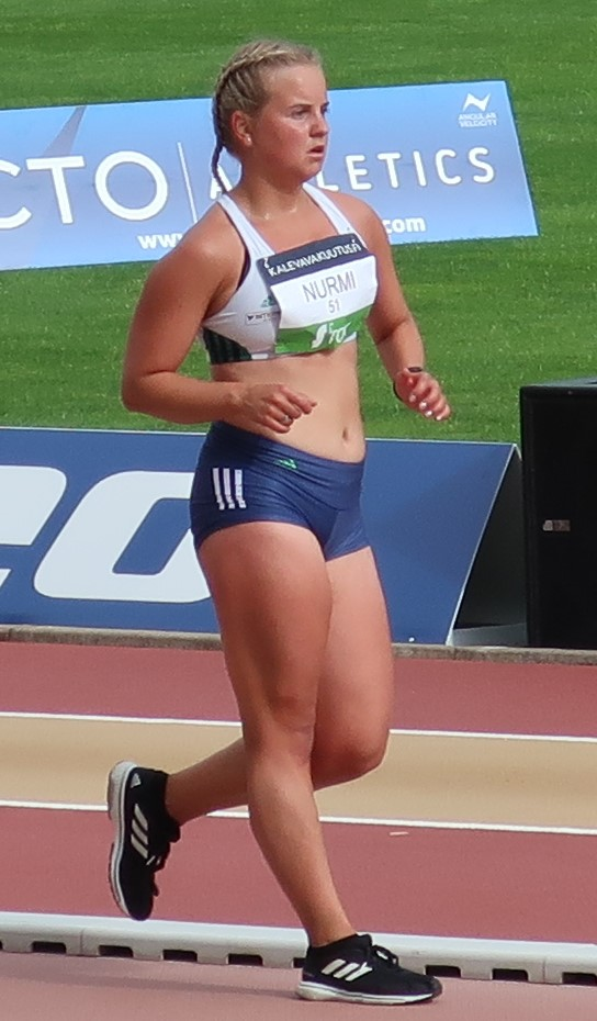 Enni Nurmi 10 000 metrin kävelyssä Paavo Nurmen stadionilla Turussa vuoden 2020 Kalevan kisojen avauspäivänä.